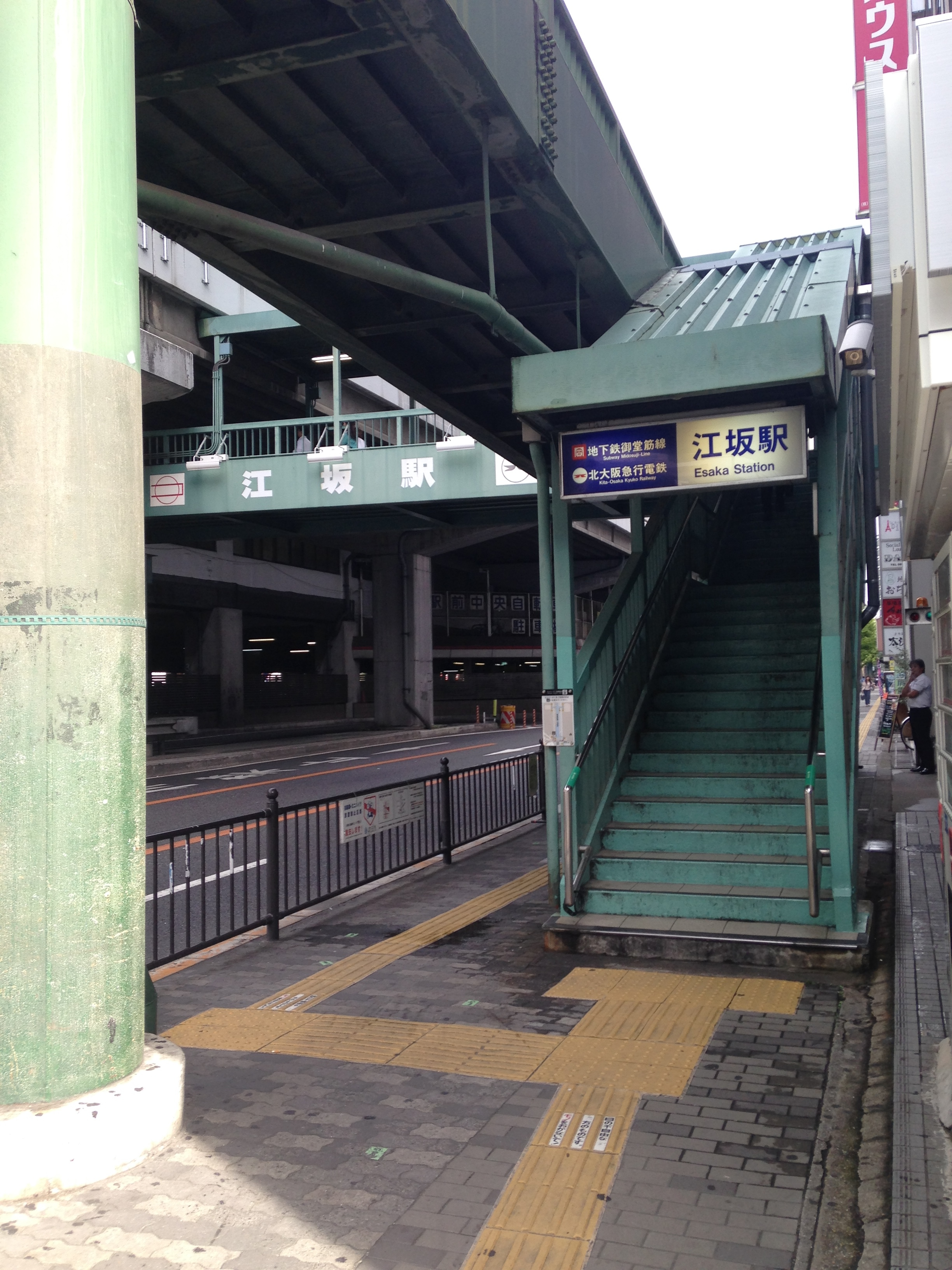 江坂駅・6番出入り口